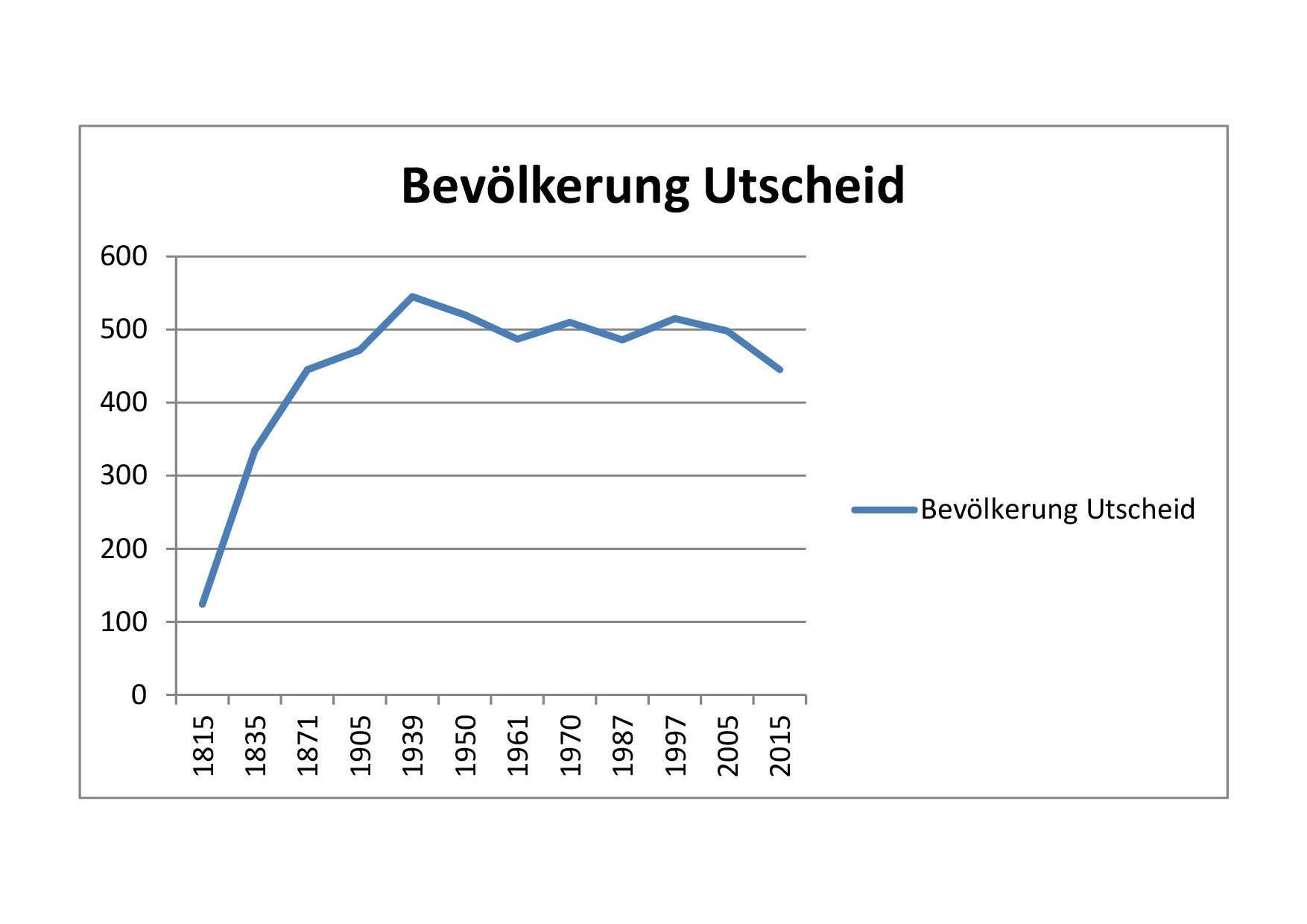 54675 Utscheid. Grafische Entwicklung der Bevölkerung. Stand 2015.